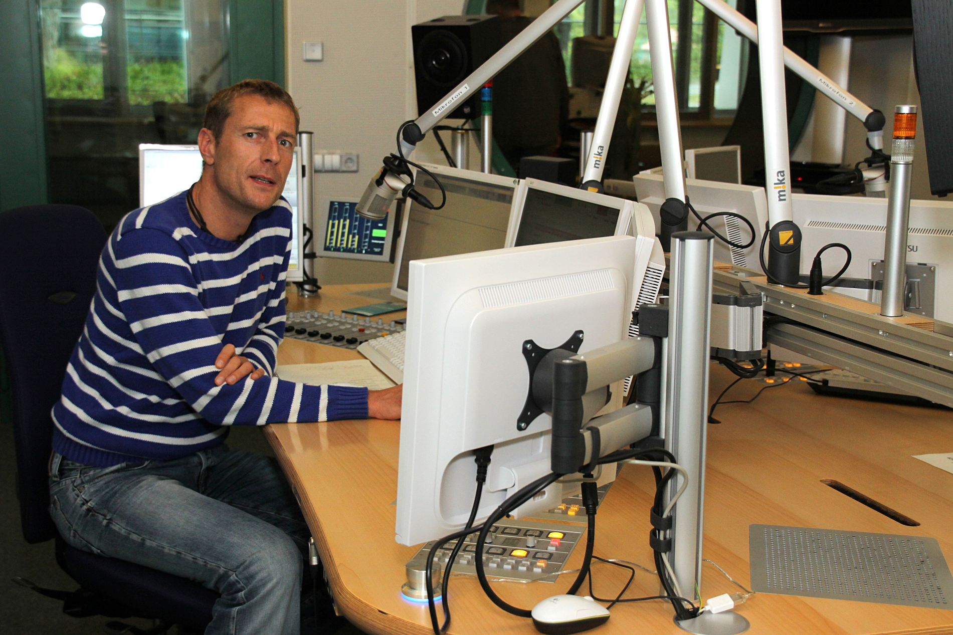 Marko Vogt im Sendestudio von NDR 1 Radio MV